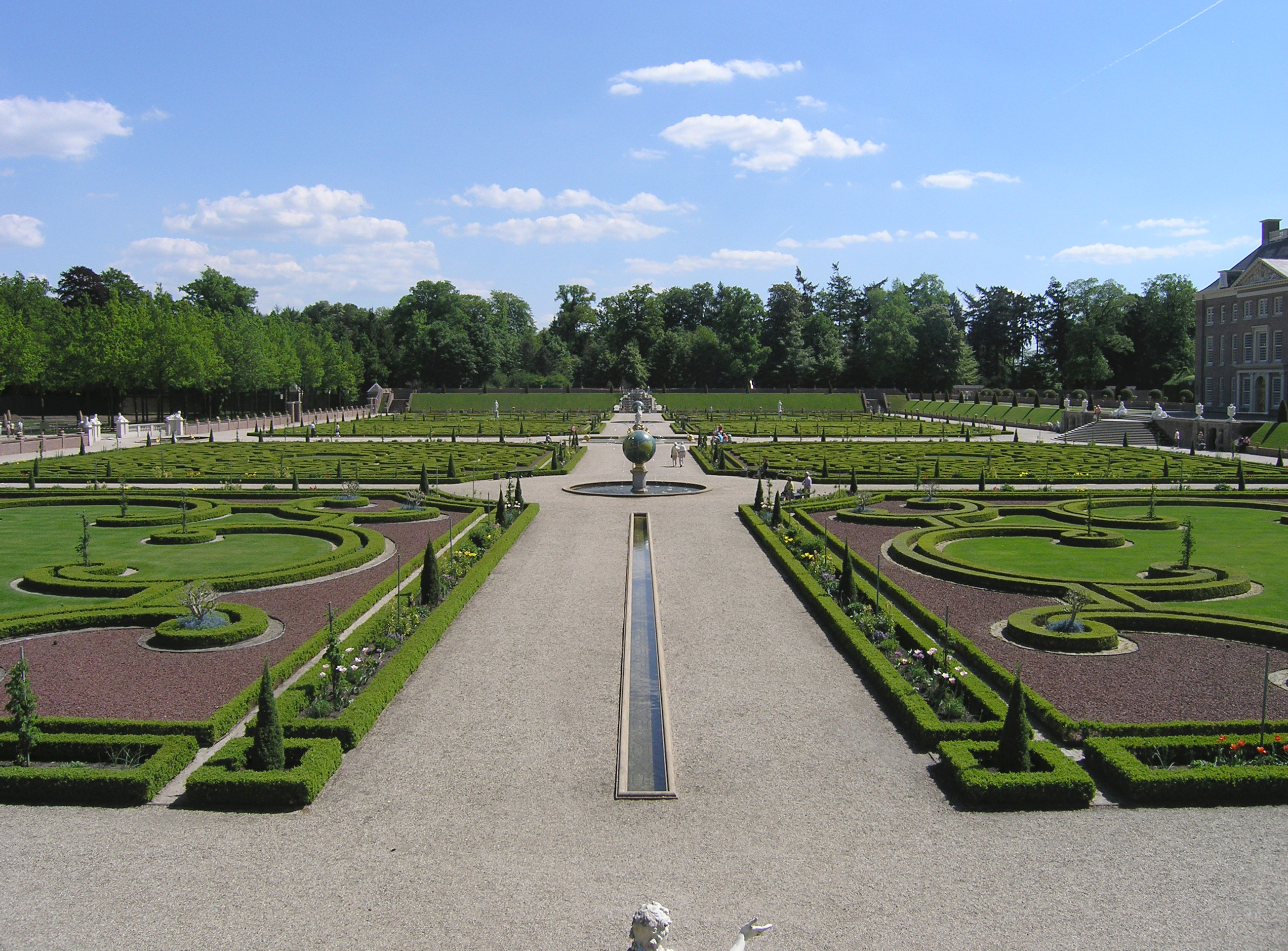 Paleis Het Loo; Transversale as door baroktuin achterzijde